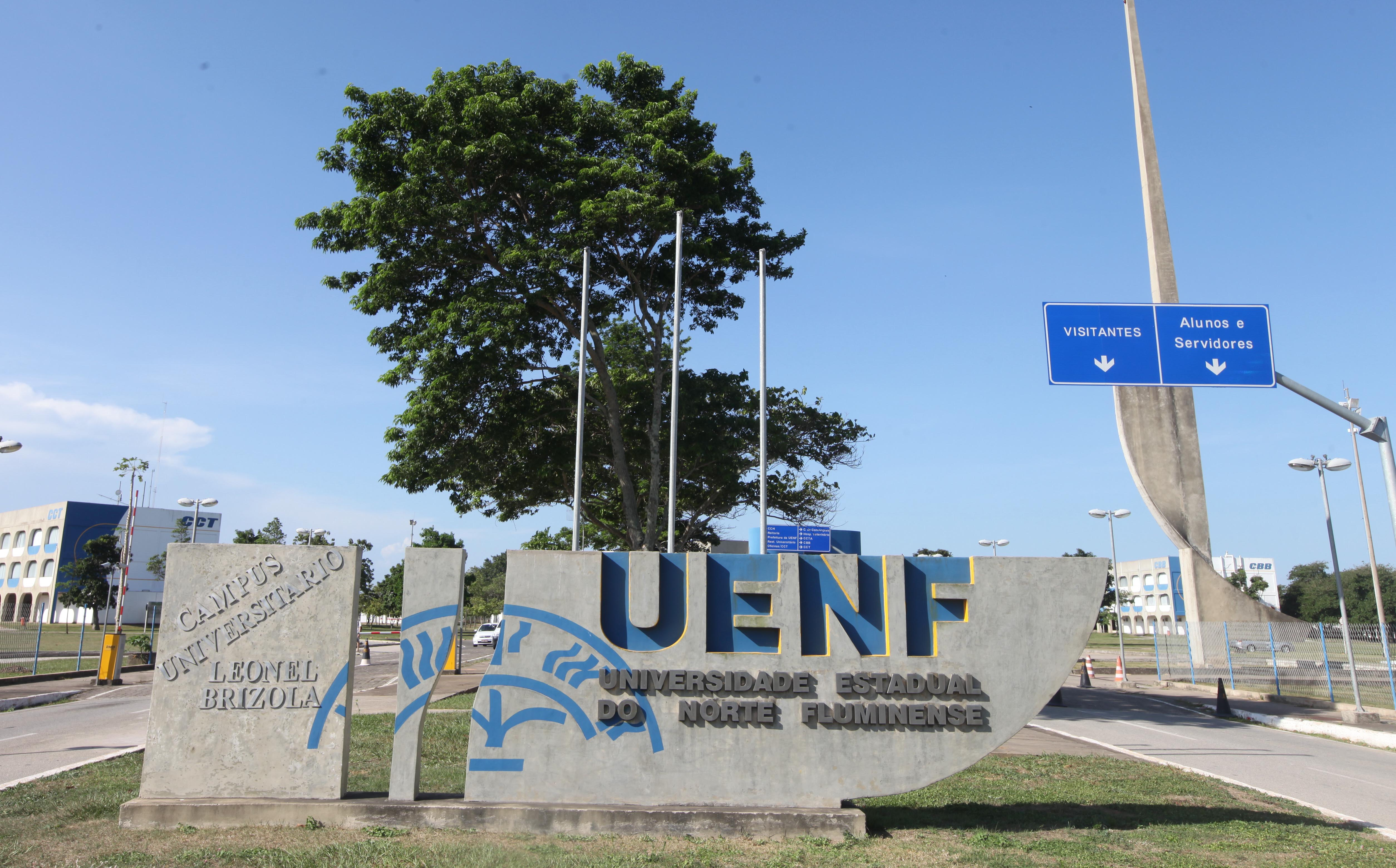 Entrada do Campus Leonel Brizola da Universidade Estadual do Norte Fluminense Darcy Ribeiro (Uenf).